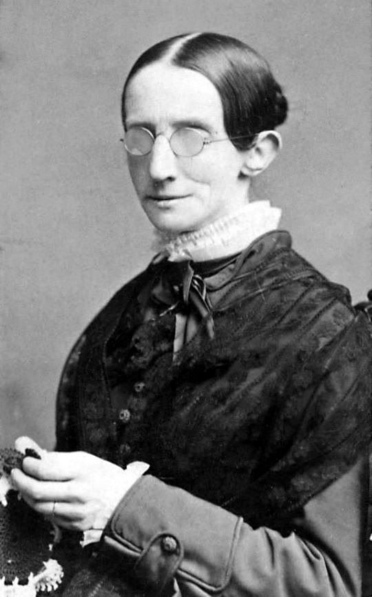 Laura Bridgman carte de visite by Warren